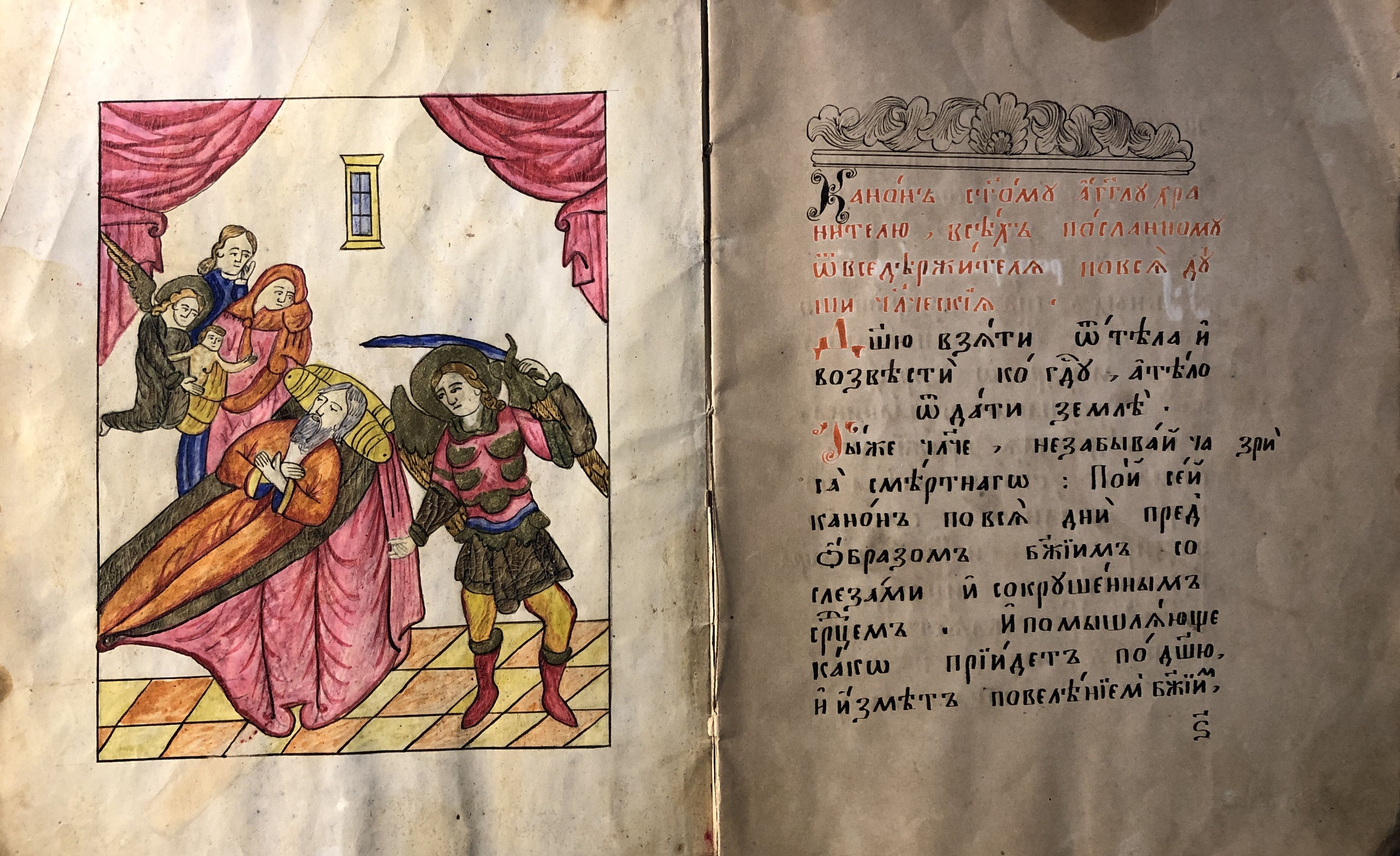 Канон Ангелу Грозному воеводе (старообрядческая лицевая рукопись, к. 19 века; частное собрание)